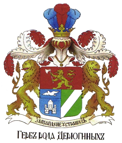 Герб рода Дерюгиных